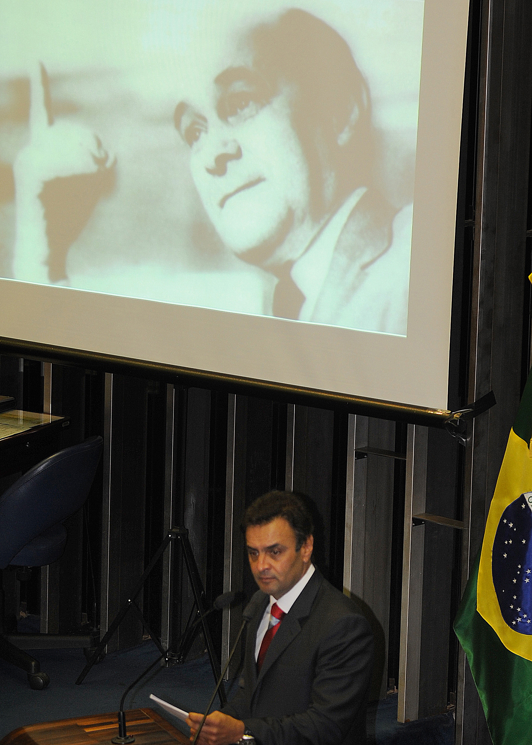 Brasília - O governador de Minas, Aécio Neves, fala durante a sessão solene do Congresso em homenagem aos 100 anos de nascimento de Tancredo Neves